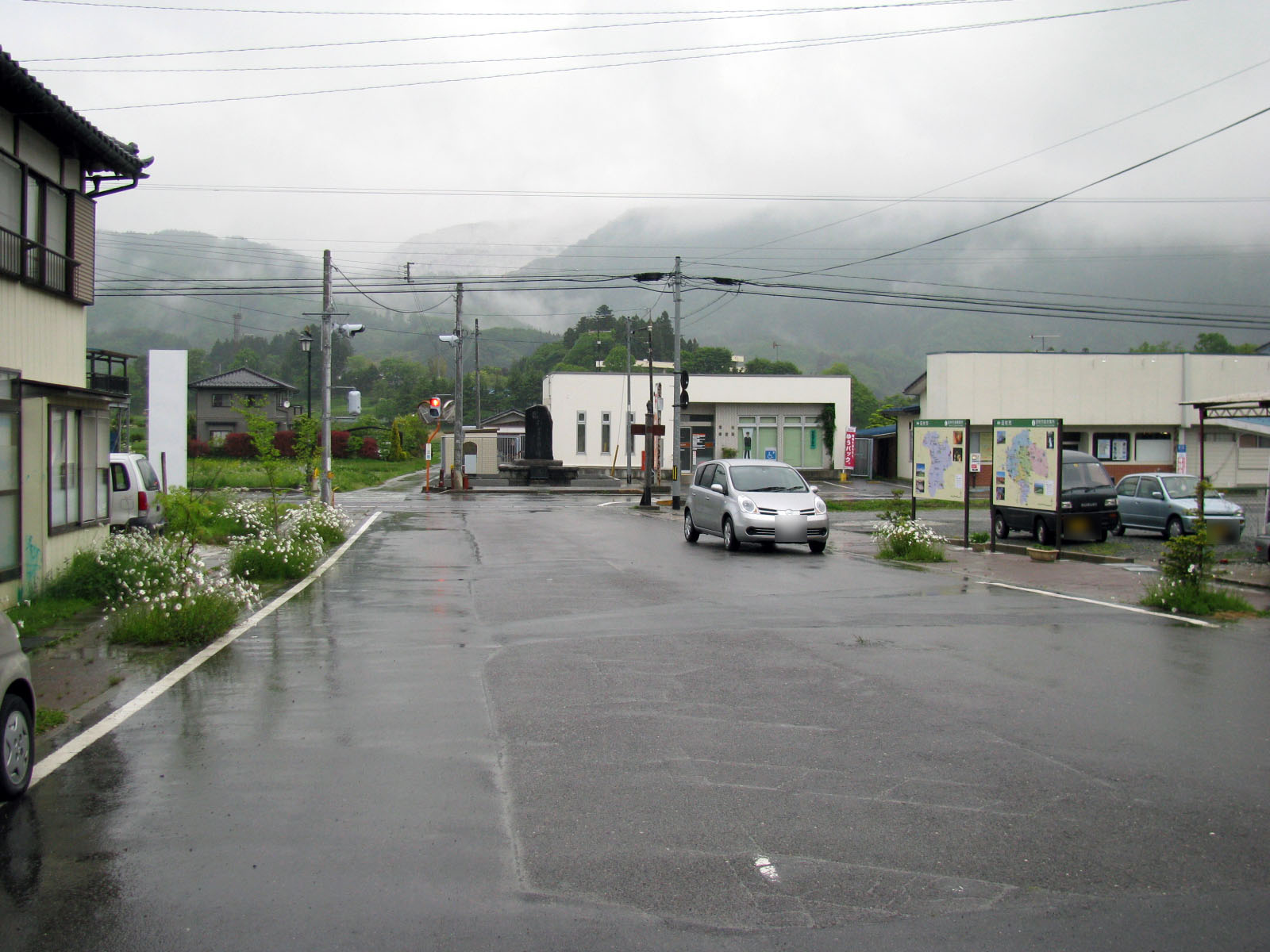 水郡線菅谷駅